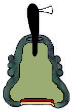 Escudo del municipio de Tepoztlán, Morelos.